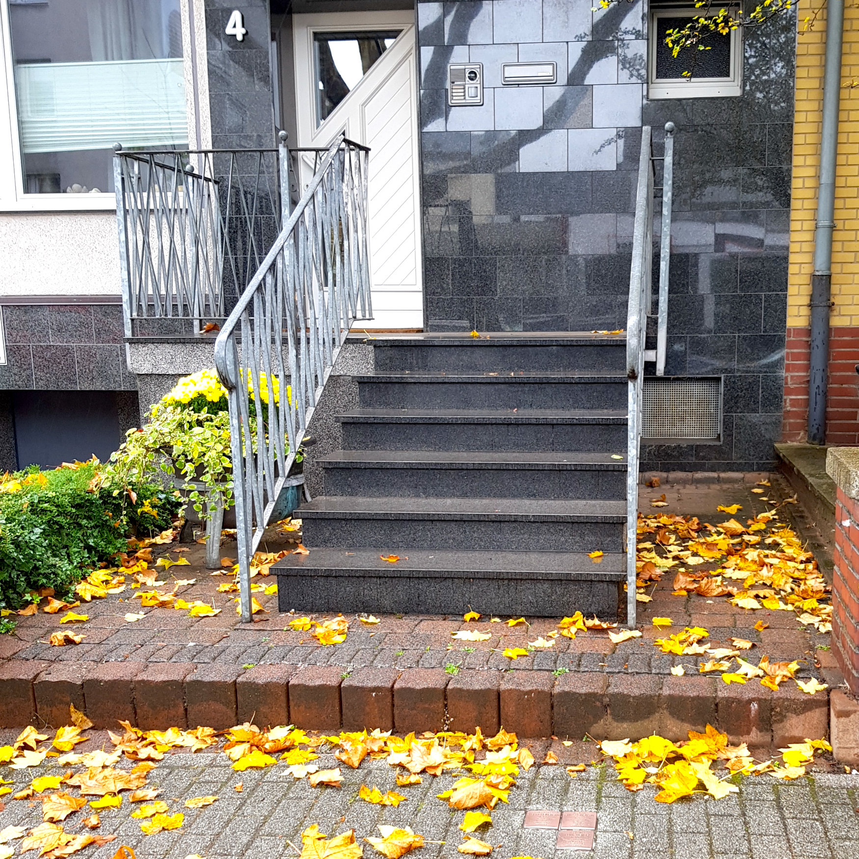 Stolpersteine in der Bechemst. 4, 47058 Duisburg